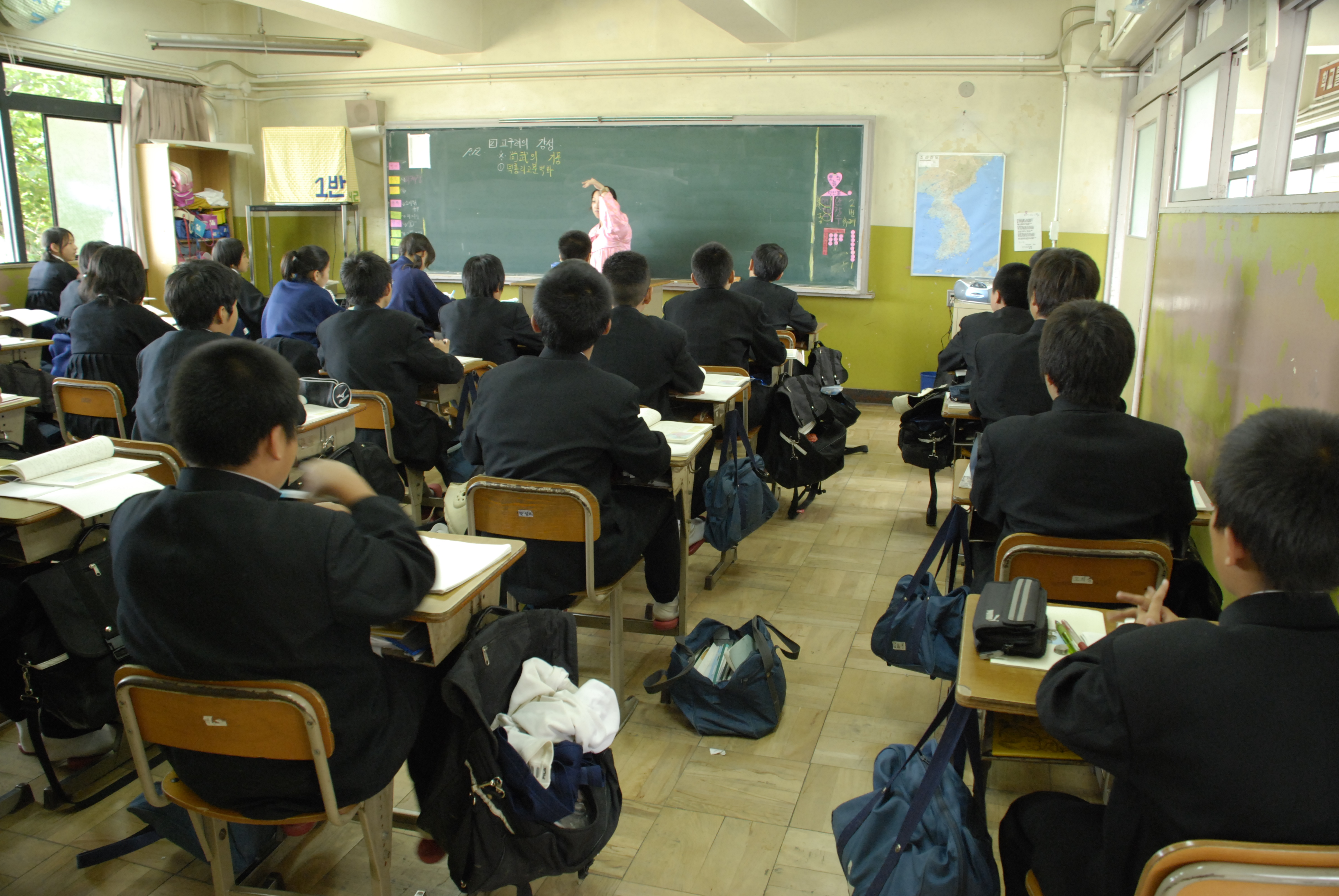 도꾜조선중고급학교의 중급부(중학교) 수업 모습